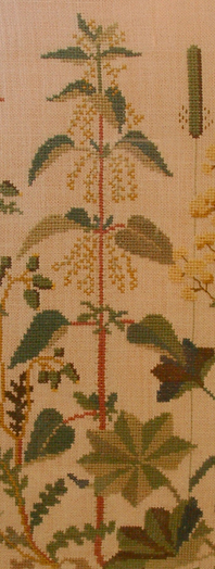 Brännässla i korsstygn, detalj ur tavlan "Blommorna vid vägen" efter mönster av Clara Waever. Se även: Korsstygnstavlan i helhet Detalj av korsstygn